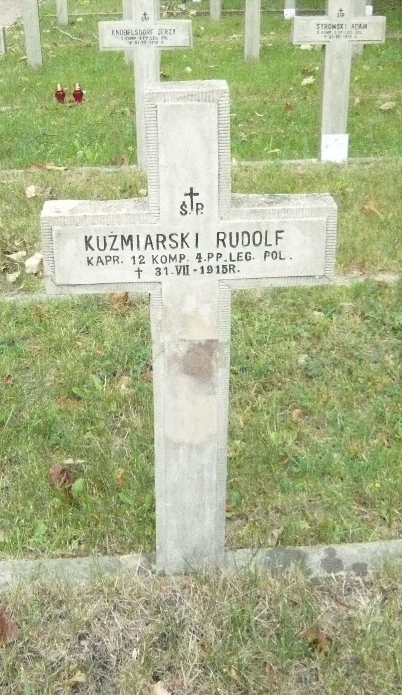 Grób Rudolfa Kuźmiarskiego na Cmentarzu Legionistów w Jastkowie